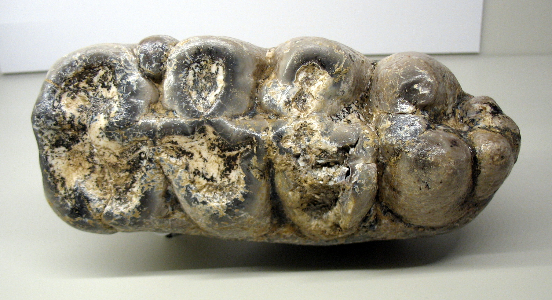 Molar de Gomphotherium angustidens. Yacimiento Carpetana (Madrid, España). Exposición temporal "La colina de los tigres dientes de sable. Los yacimientos miocenos del cerro de los Batallones (Torrejón de Velasco, Comunidad de Madrid)" en el Museo Arqueológico Regional (MAR), Alcalá de Henares (Madrid)